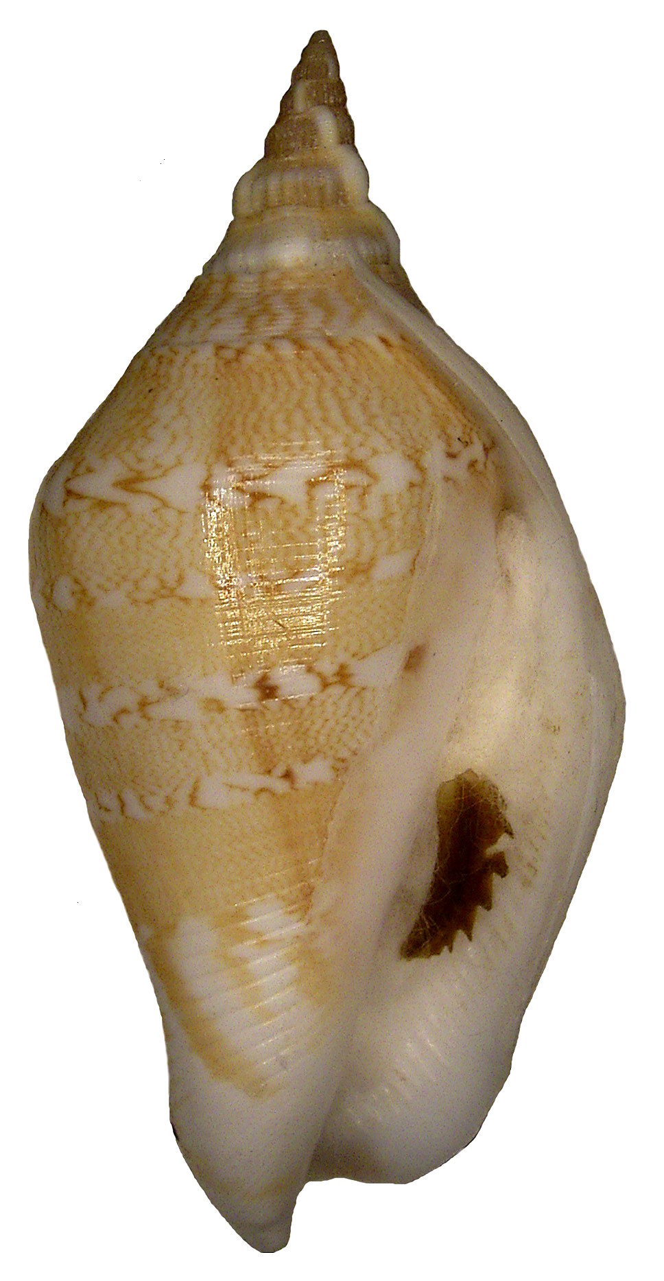 Margistrombus marginatus; Familie: Strombidae Groesse: 45 mm Verbreitung: Indischer Ozean Photo: U.Schmidt, 2007